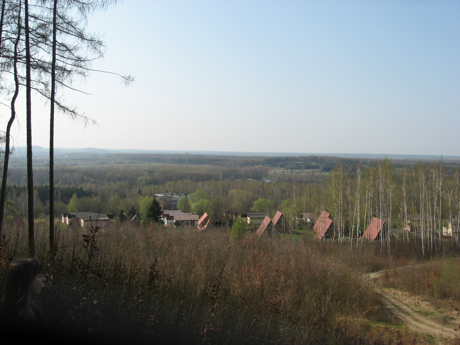 Widok na ul. Wczasową z góry Buczyna